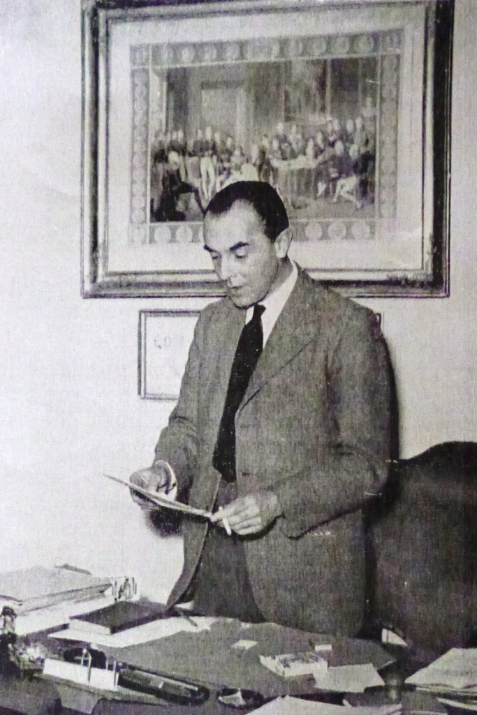 Arnold Struycken à son bureau du Conseil de l'Europe, devant un tableau représentant le Congrès de Vienne